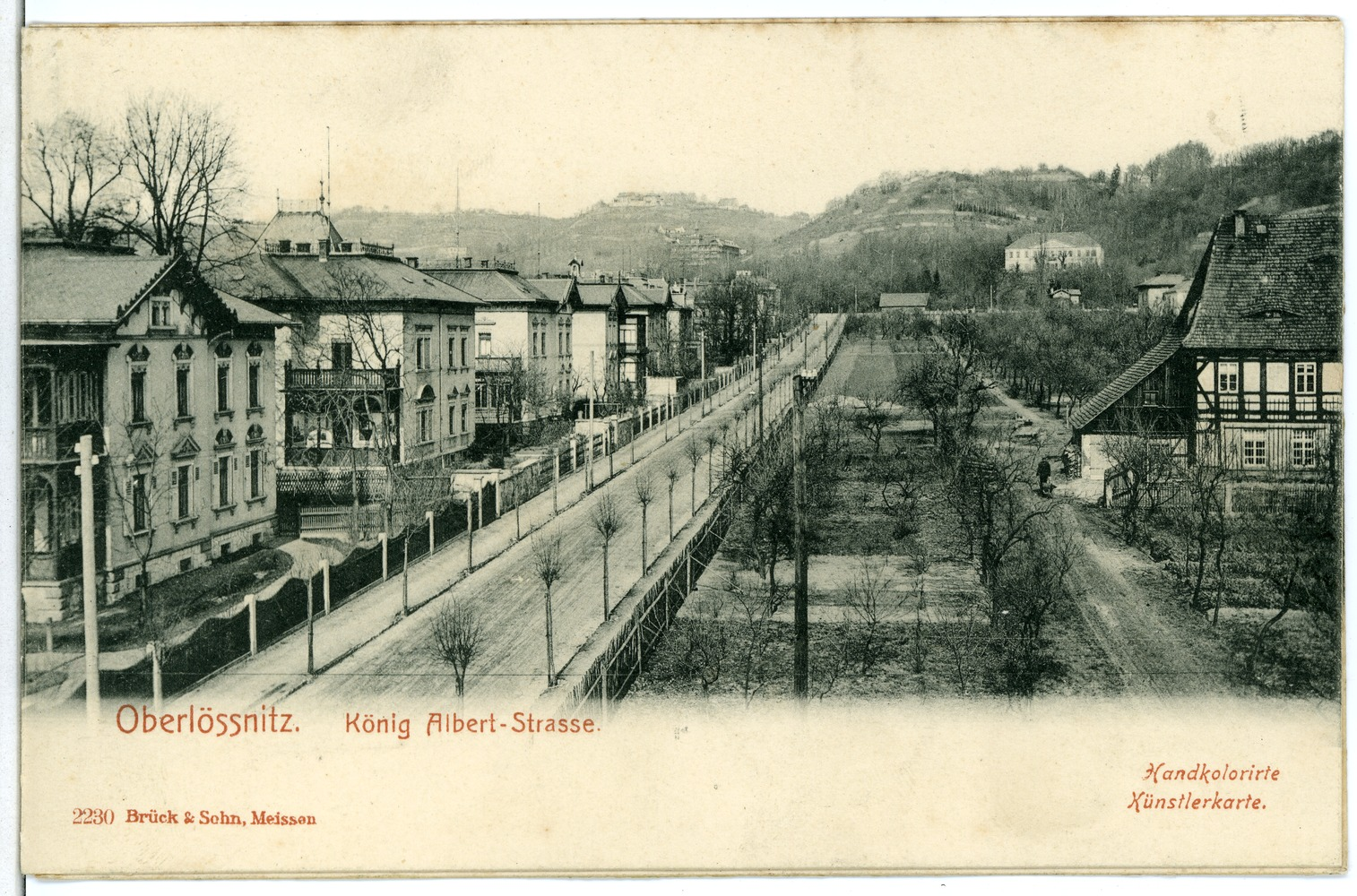 Oberlößnitz; König Albert Straße This postcard is from publisher Brück & Sohn in Meißen ( postcard has a unique number 02230 and is available in a higher resolution at the publisher. This images was uploaded in a cooperation project between Wikipedians and the publisher.